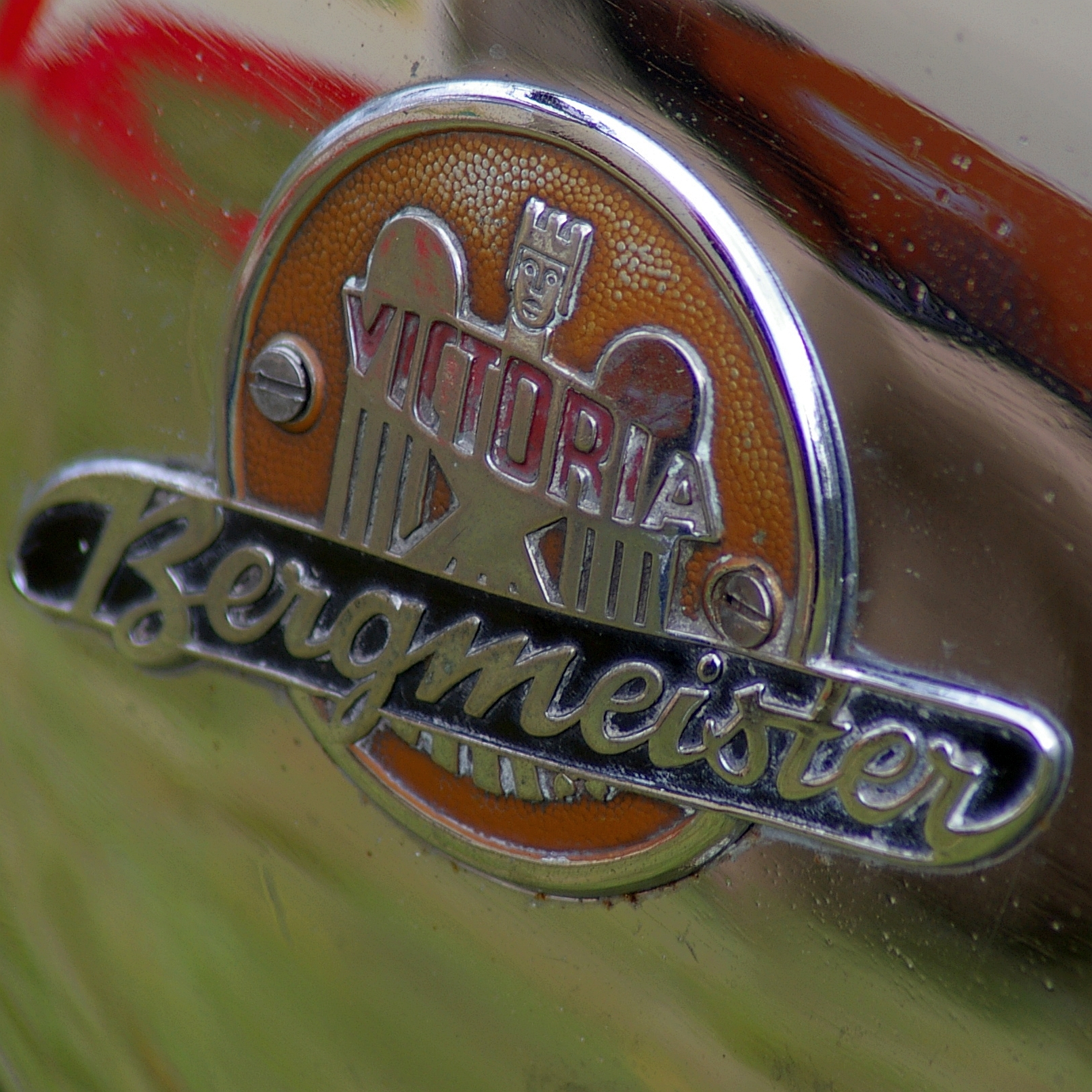 Logo der Motorradmarke Victoria-Bergmeister